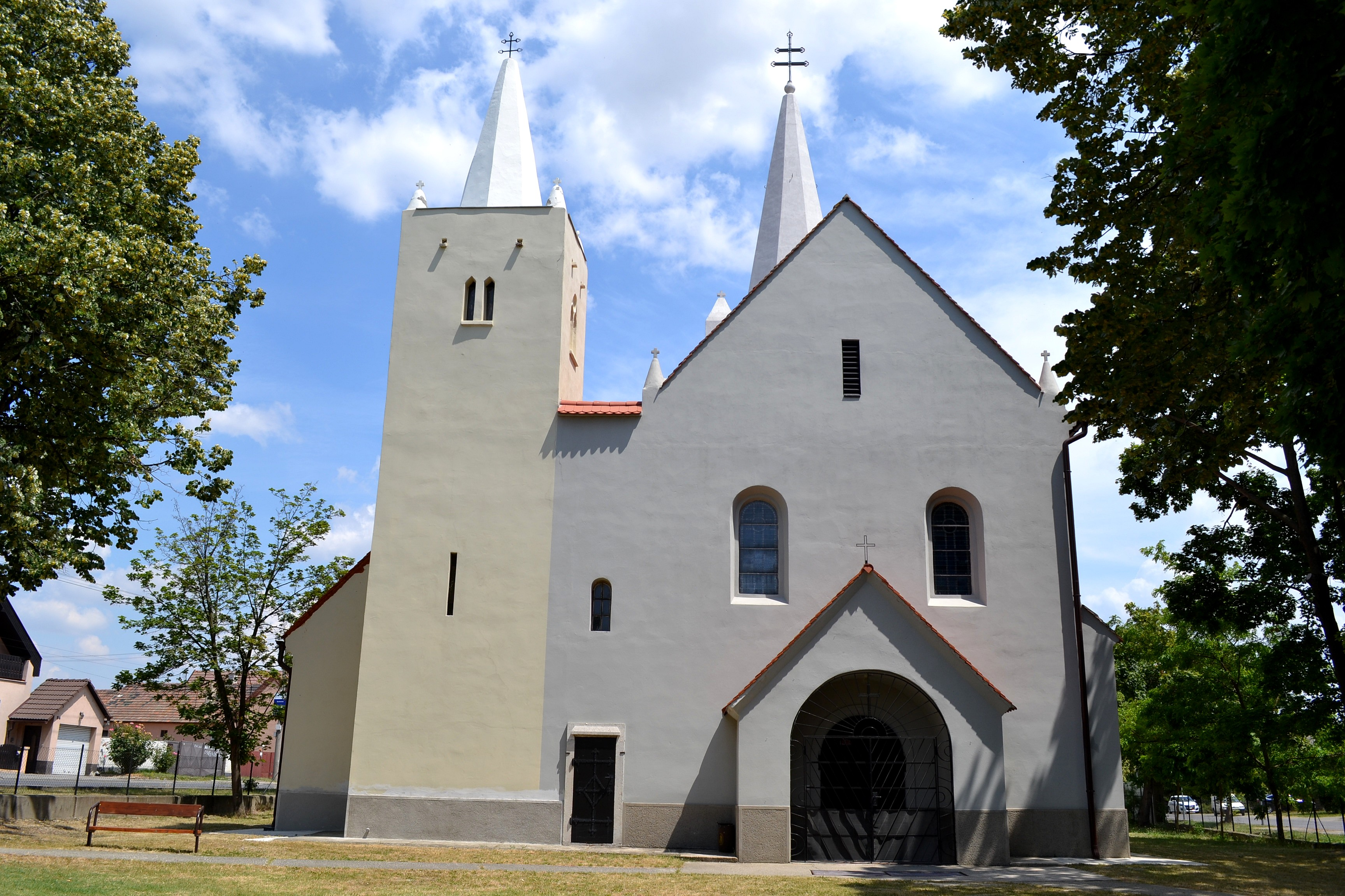 Kostol Najsvätejšieho Srdca Ježišovho v Moste pri Bratislave; západné priečelie